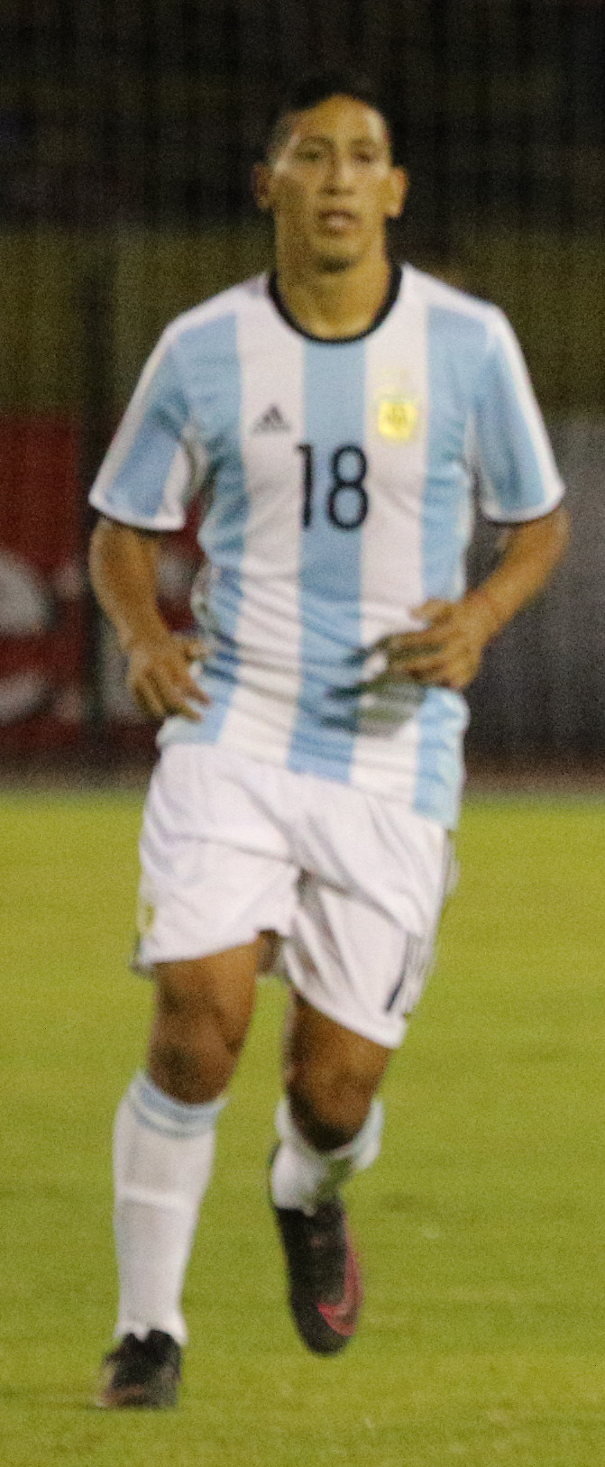 Quito, 7 Feb (Andes).- Encuentro por copa libertadores entre Nacional de Ecuador vs Atlético Tucumán de Argentina. Fotografías: Carlos Rodríguez/Andes.